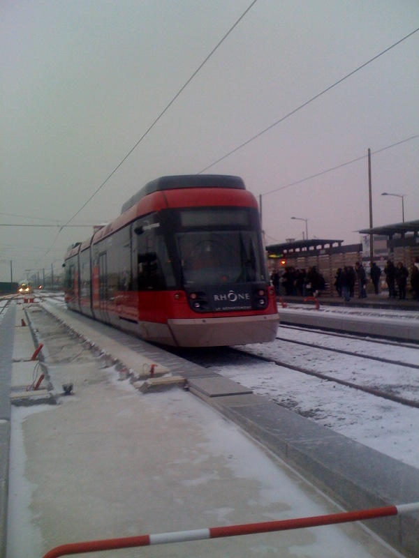 rame tango ligne Rhône express